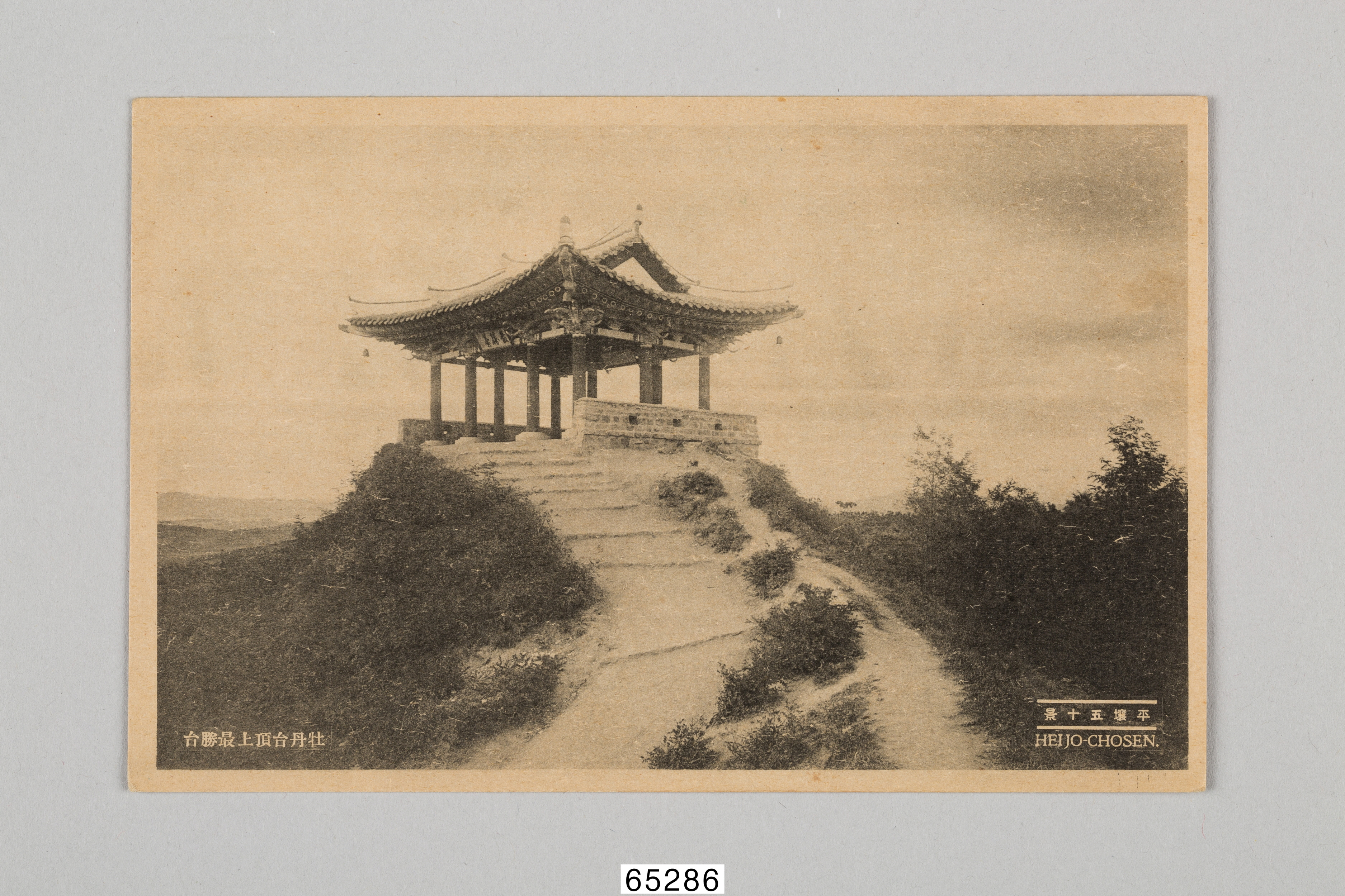 평양의 풍경이 인쇄된 엽서. Taisho Hato 발행. 앞면에 평양 모란봉 정상에 있는 최승대 전경을 담은 흑백사진이 인쇄됨. 좌측 하단에는 '牡丹台頂上最勝台'이, 우측 하단에는 '平壤五十景'과 'HEI JO-CHOSEN.'이 인쇄됨. 뒷면에 우표부착란, 내용기입란, 'MADE IN WAKAYAMA' 등이 인쇄됨.